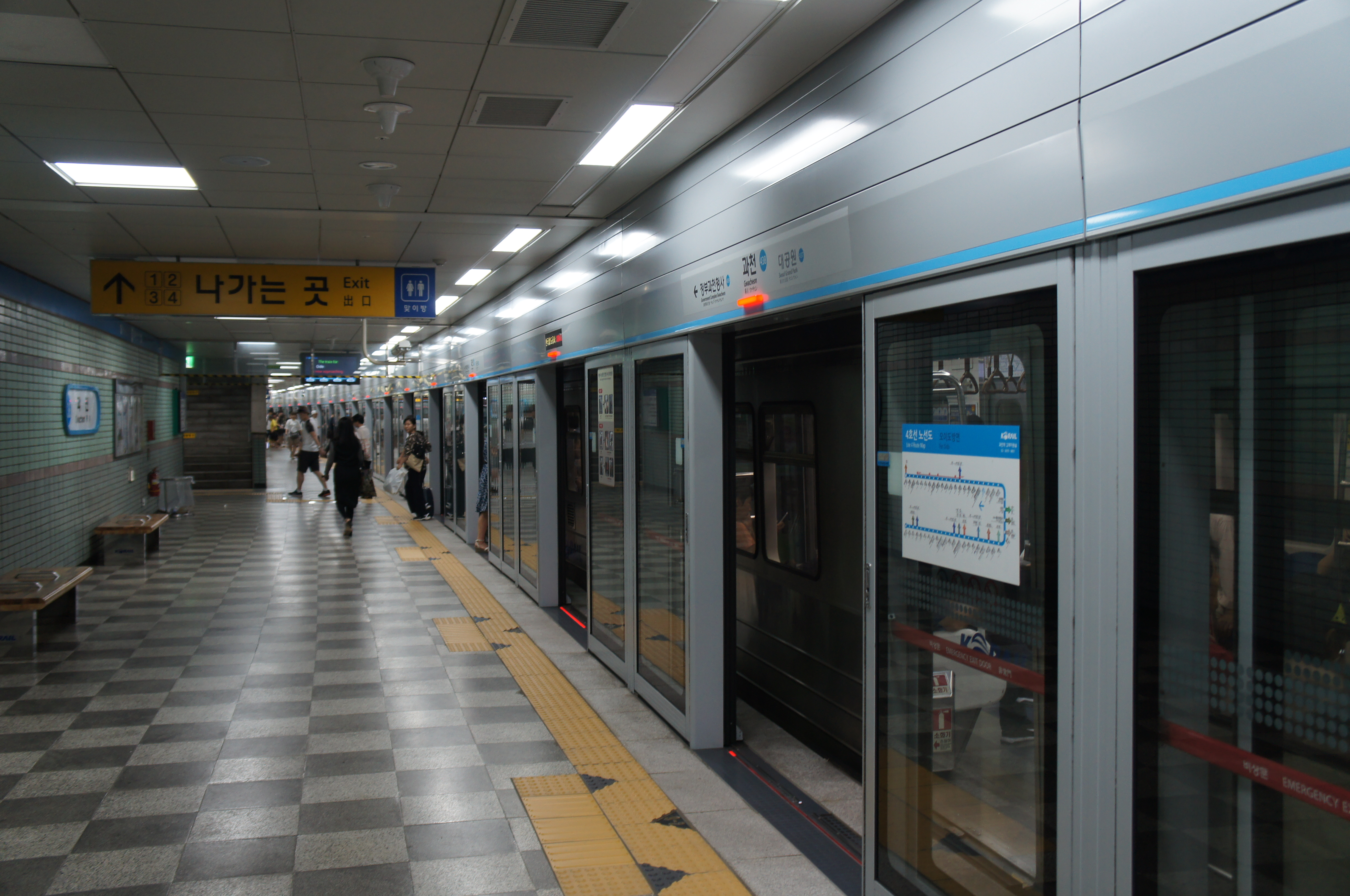 과천역 승강장